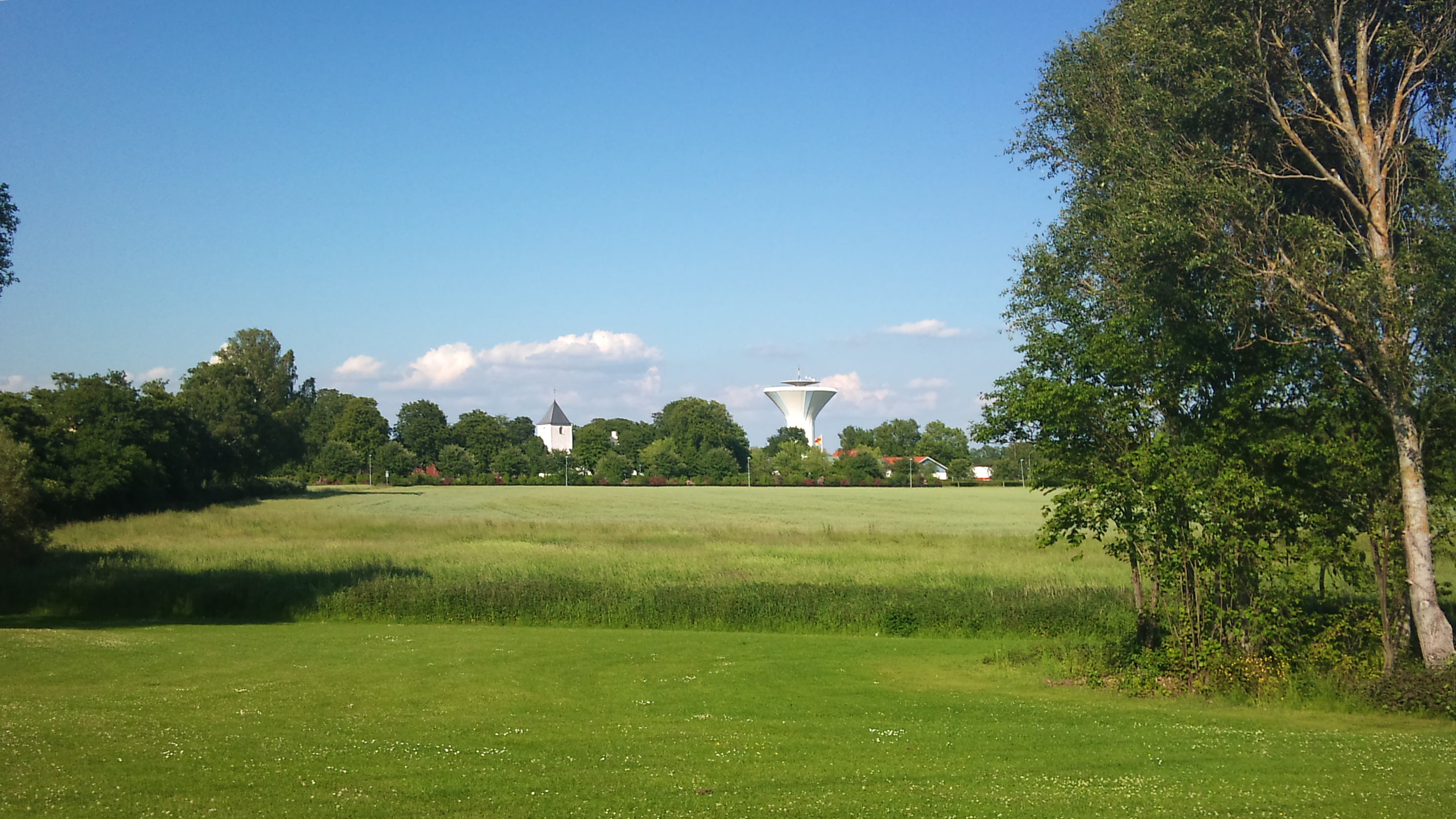 Vy över Bjuv med kyrk- och vattentorn.